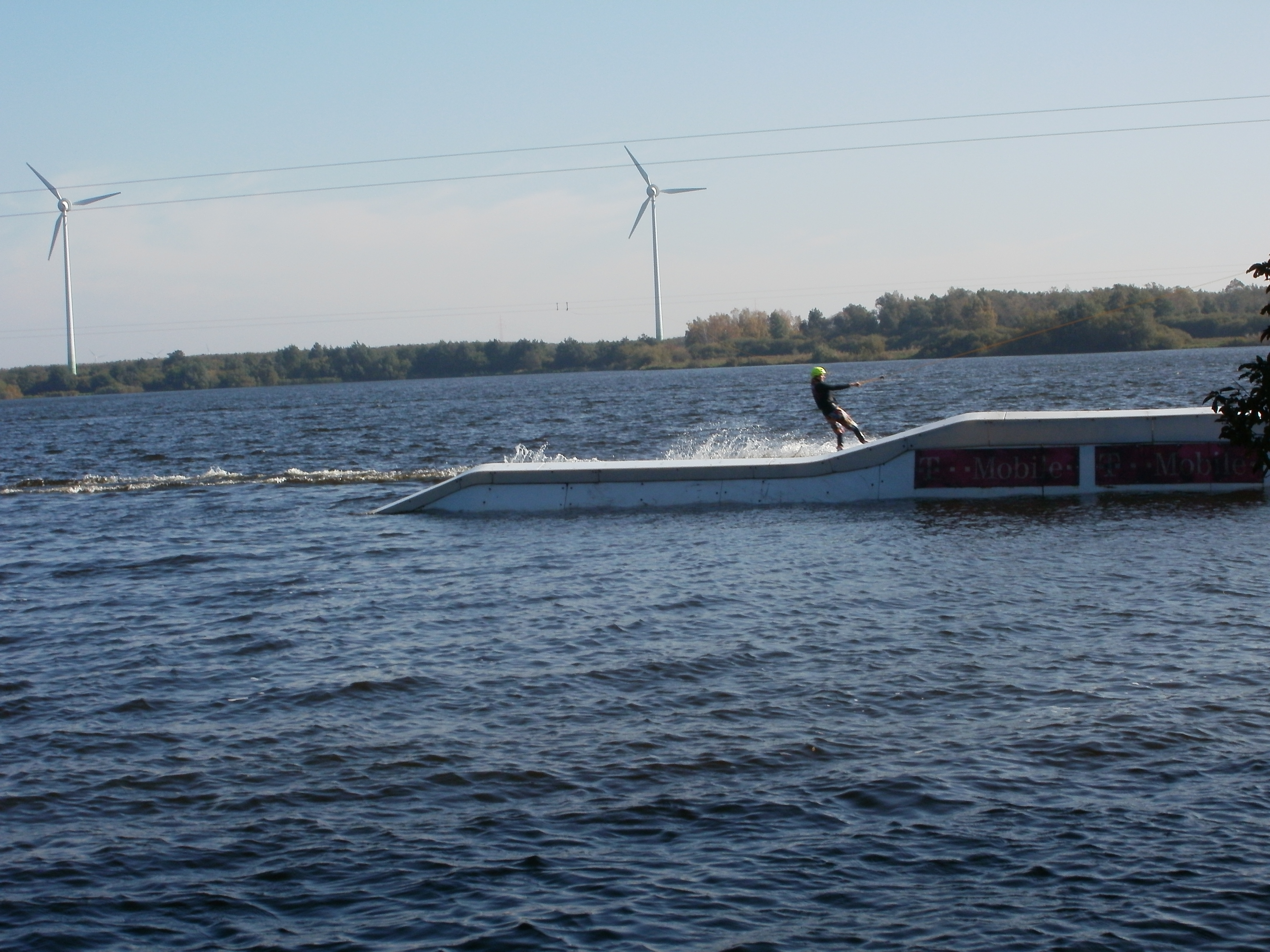 Surfanlage am Baggerteich in Hamburg-Neuland